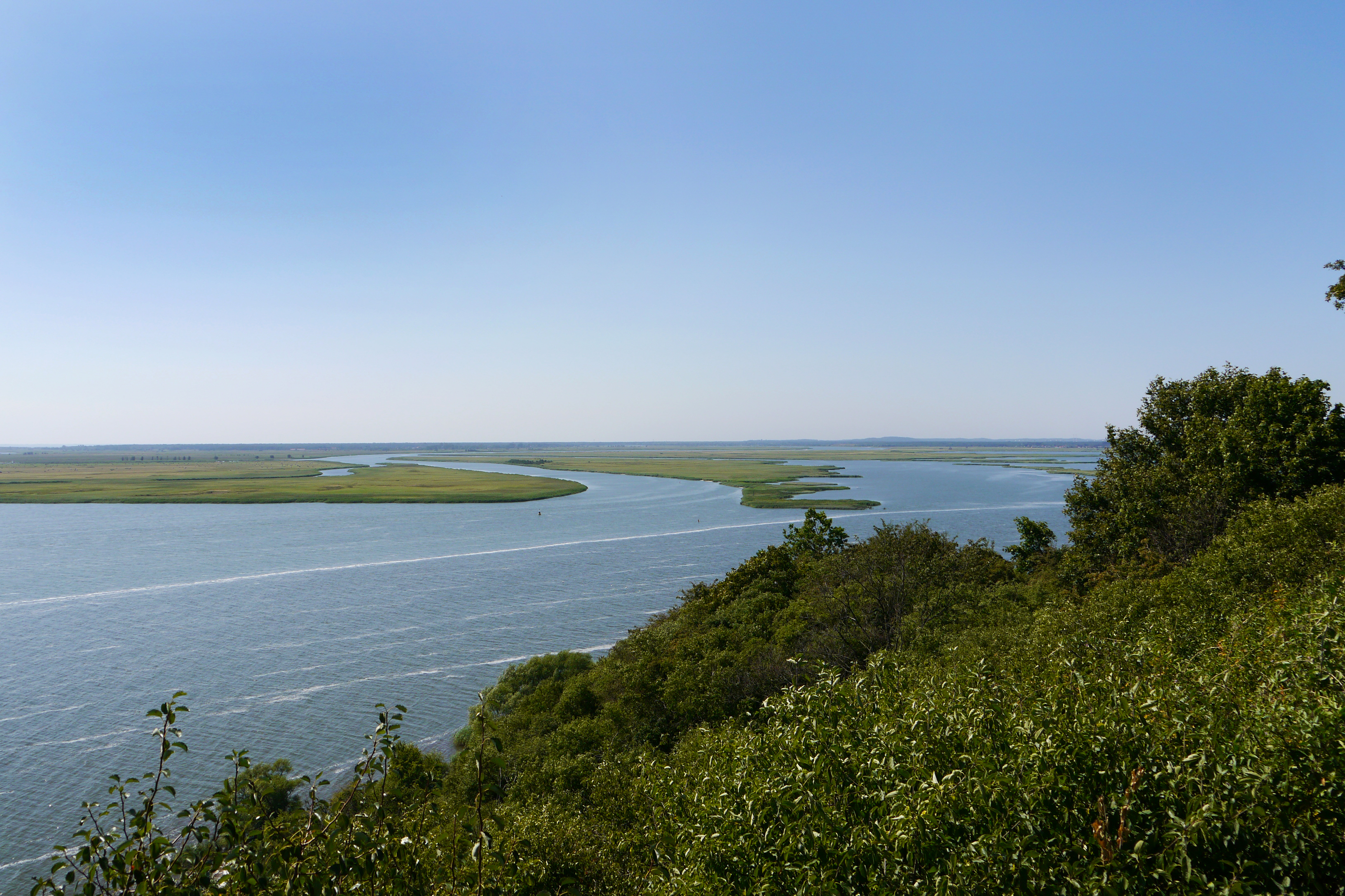 Stettiner Haff (polnisch: Zalew Szczeciński) bei Lubin, Blick auf die alte Swine (polnisch: Stara Świna)